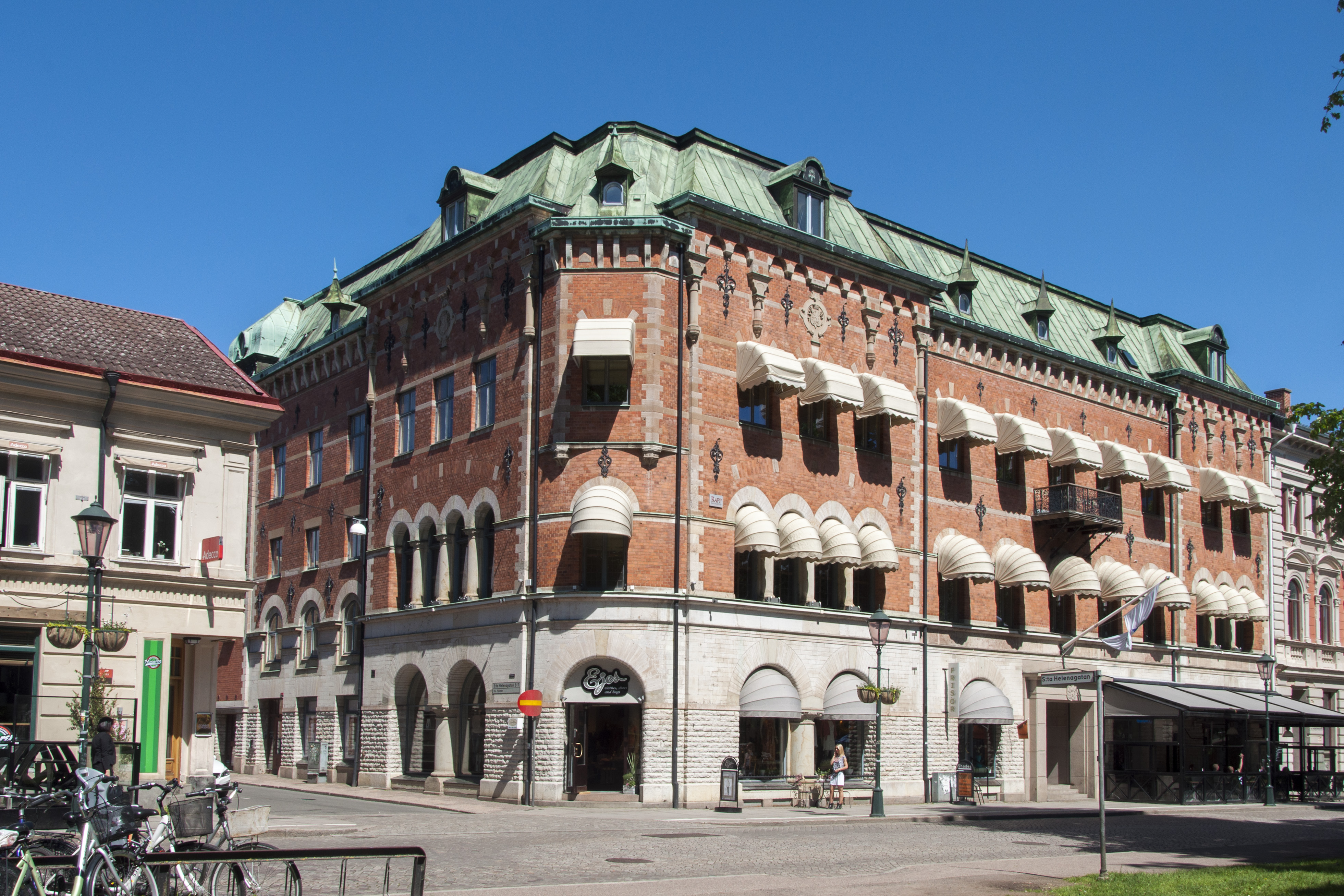 f.d. Skaraborgs enskilda bank i Skövde. kv. Flojner 5. Byggnadsår 1893 - 1894. Arkitekt Magnus Steendorff . 1910 Tillbyggnad mot norr med ny banksal. Arkitekt Gustaf Wickman